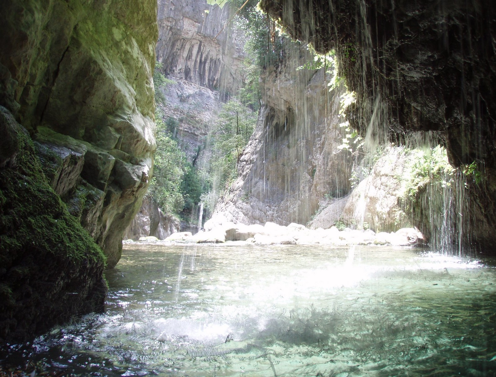 Espectacular engorjat del Forat o deu de Bulí, entre Gavarra (Coll de Nargó) i La Baronia de Rialb, al Prepirineu català.